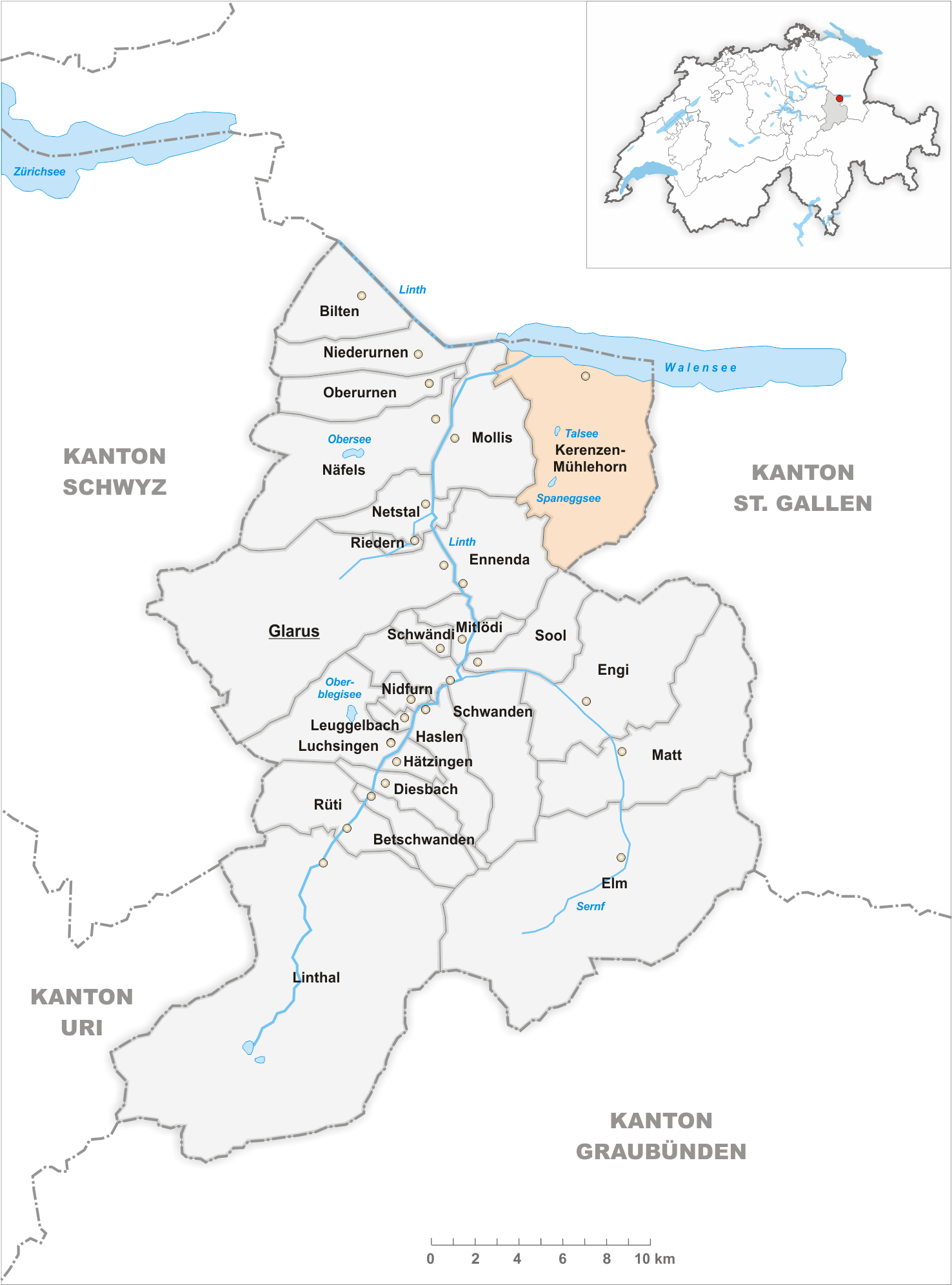 Municipality Kerenzen-Mühlehorn Artist: Tschubby